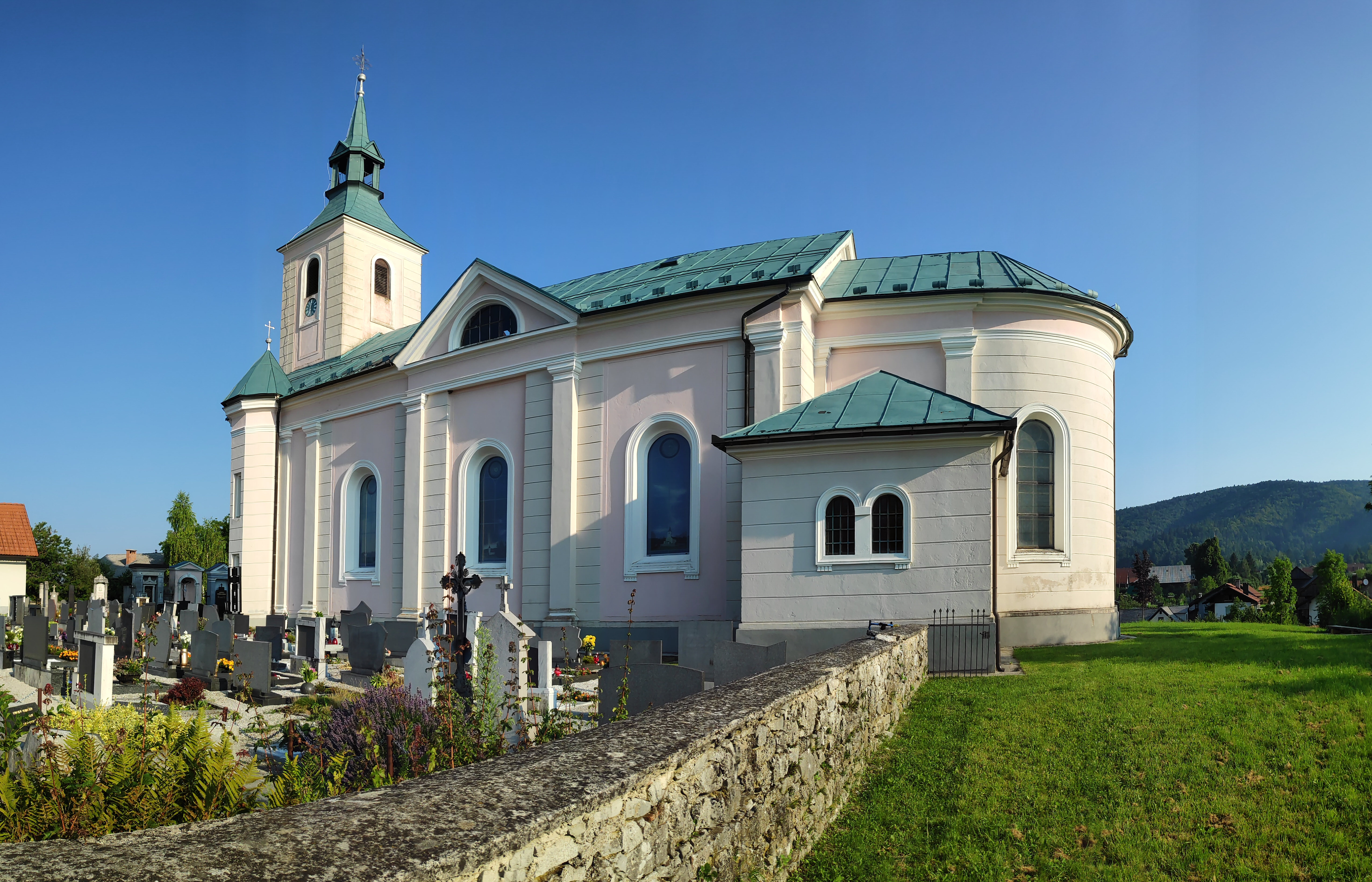 Cerkev svetega Jerneja (Begunje pri Cerknici)